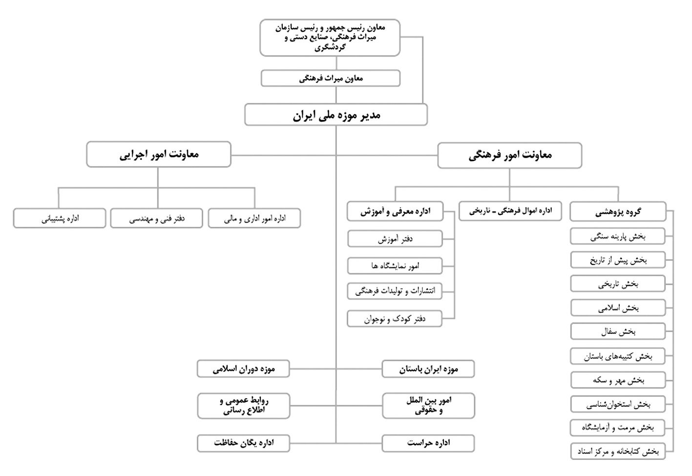 چارت تشکیلاتی موزه ملی ایران شامل بخشهای مختلف این موزه